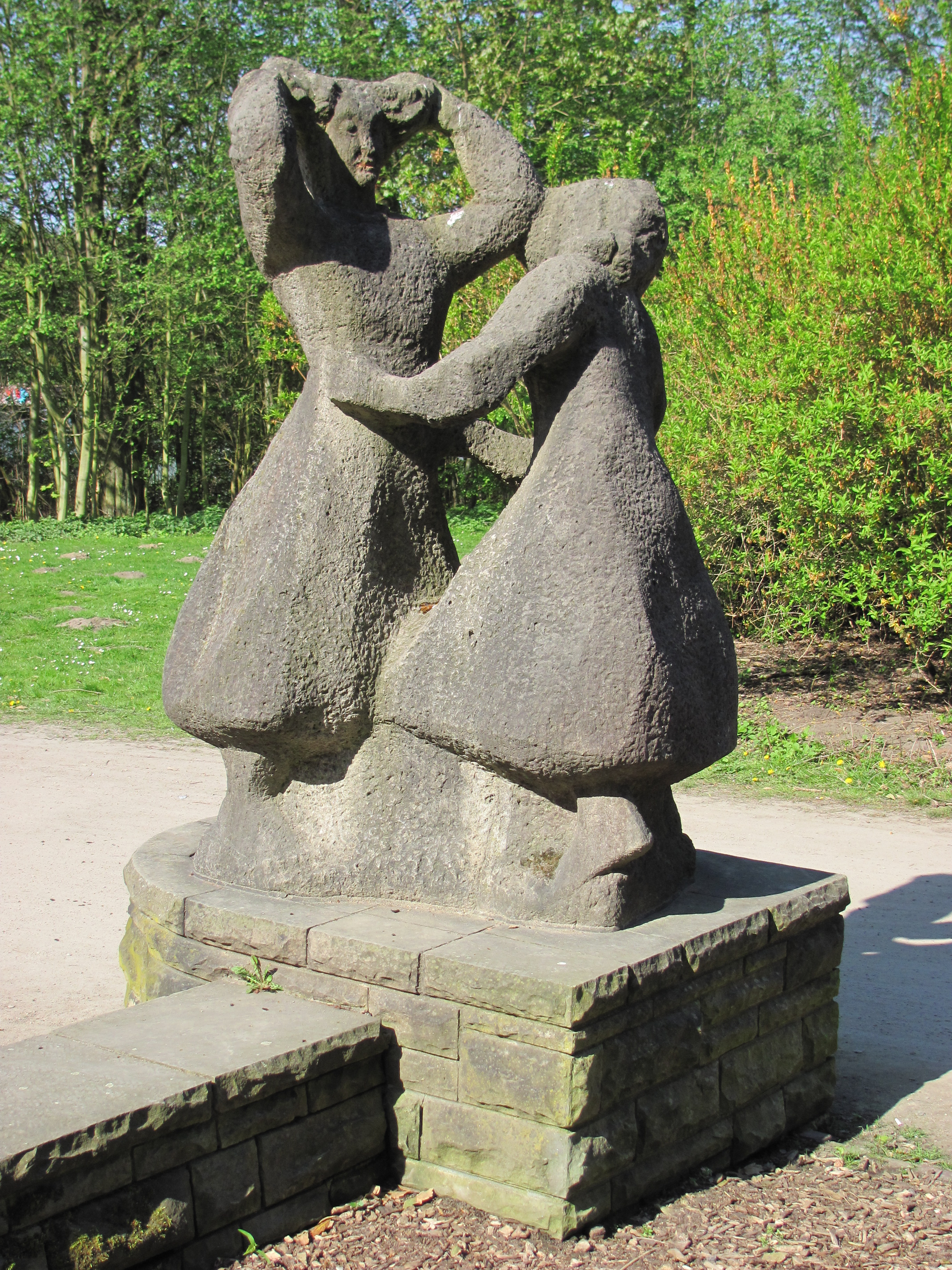 „Tanzende Mädchen“ von Karl August Ohrt (nicht Orth!) im Hamburger Stadtpark